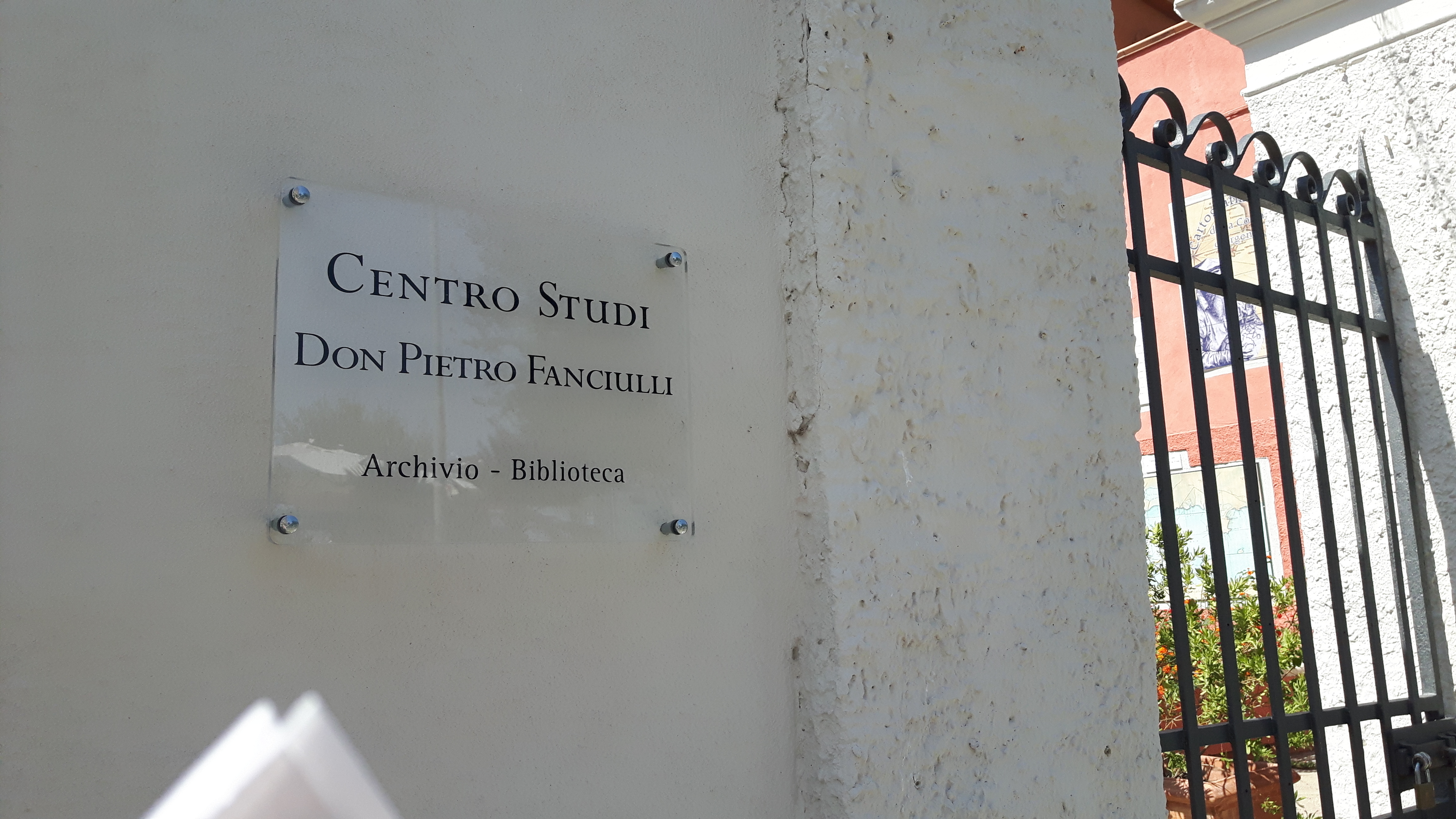 Ingresso del Centro Studi "Don Pietro Fanciulli" di Porto Santo Stefano